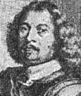 Svenske fältmarskalken Lorens von der Linde